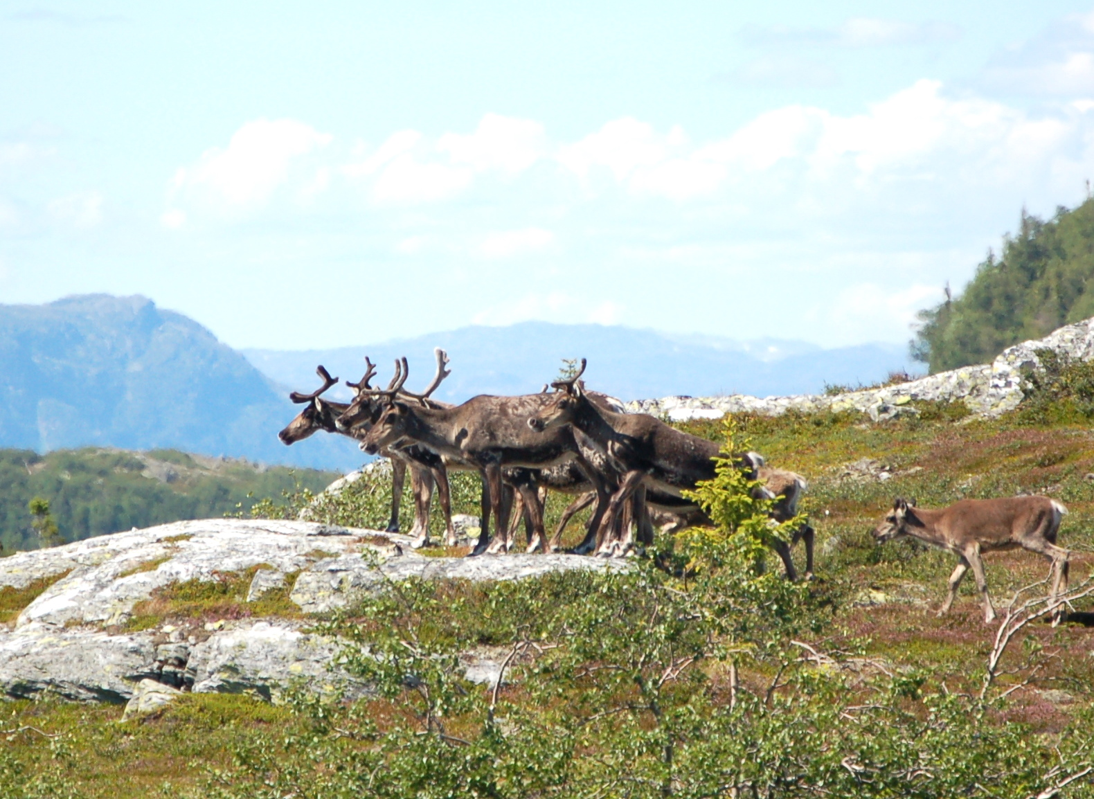 Villrein på Blefjell